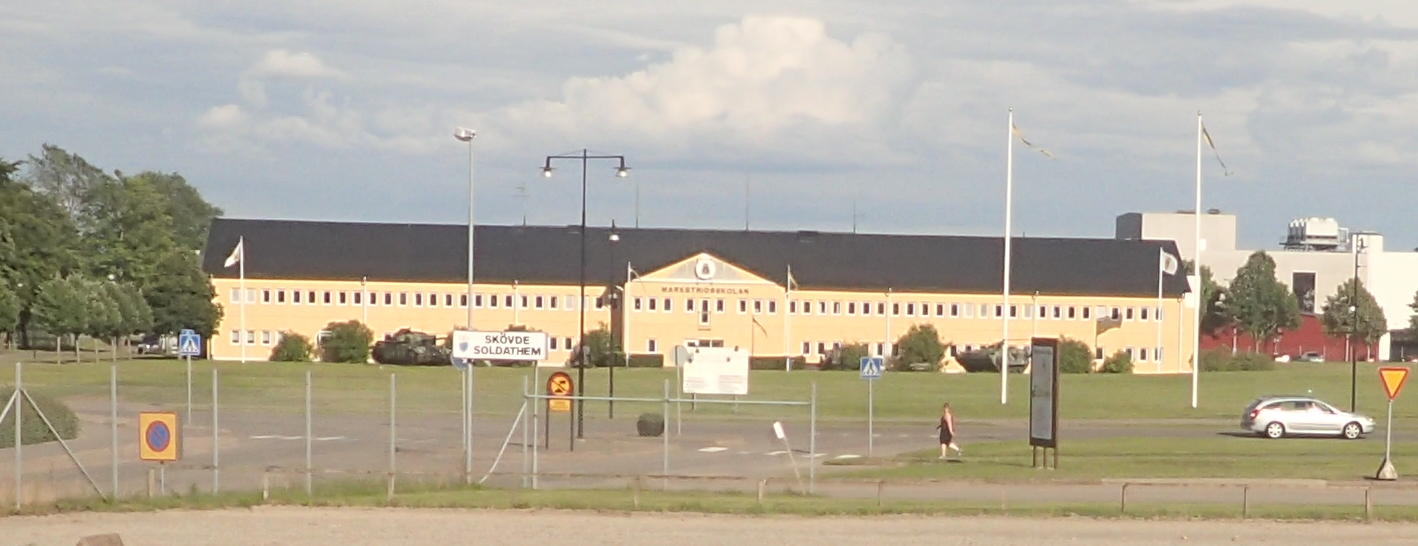 Markstridsskolan i Skövde. Bild tagen från förbipasserande tåg.